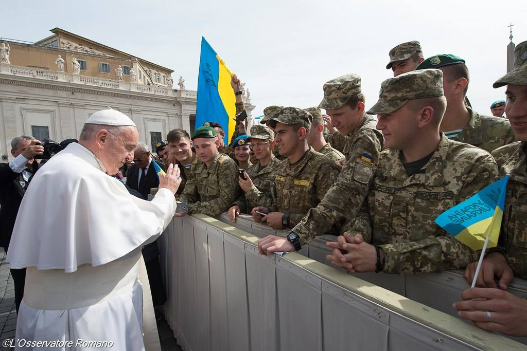 Перед початком загальної аудієнції у середу, 25 травня 2016 р., Папа Римський Франциск, зійшовши з панорамного автомобіля, яким він об’їжджав між секторами на площі Святого Петра, вітаючи паломників, підійшов до групи українських військових. Святіший Отець привітався з військовиками, що брали участь у військовому паломництві до Люрду, та поблагословив їх. Серед них булі ті, які отримали бойові поранення під час виконання завдань в зоні АТО. Мова йде про учасників 58-го міжнародного військового паломництва до Марійського відпустового центру у Франції, що тривало від 20 до 22 травня на тему «Двері завжди відчинені», а його головним лейтмотивом було Боже милосердя. Участь у прощі щороку беруть військовослужбовці із різних країн світу, молячись за мир. Від 1996 року до нього приєдналися військовослужбовці та правоохоронці з України. Вже стало традицією, що по завершенні заходів у Франції військові з України приїжджають на зустріч з Папою. Радіо Ватикану